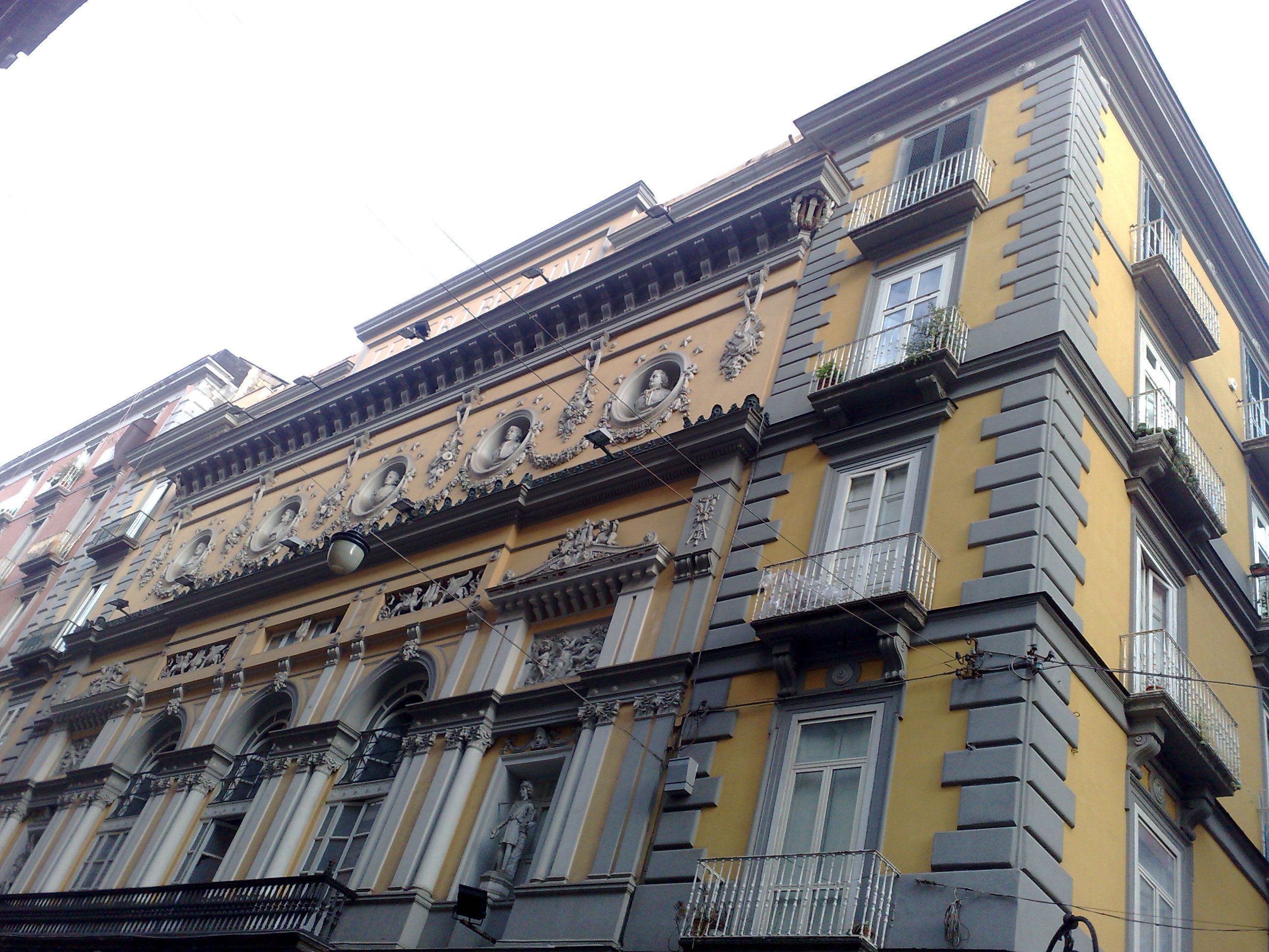 Teatro Bellini, Napoli